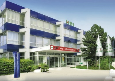 Zentrale der HDI Versicherung in 1120 Wien, Edelsinnstr. 7-11